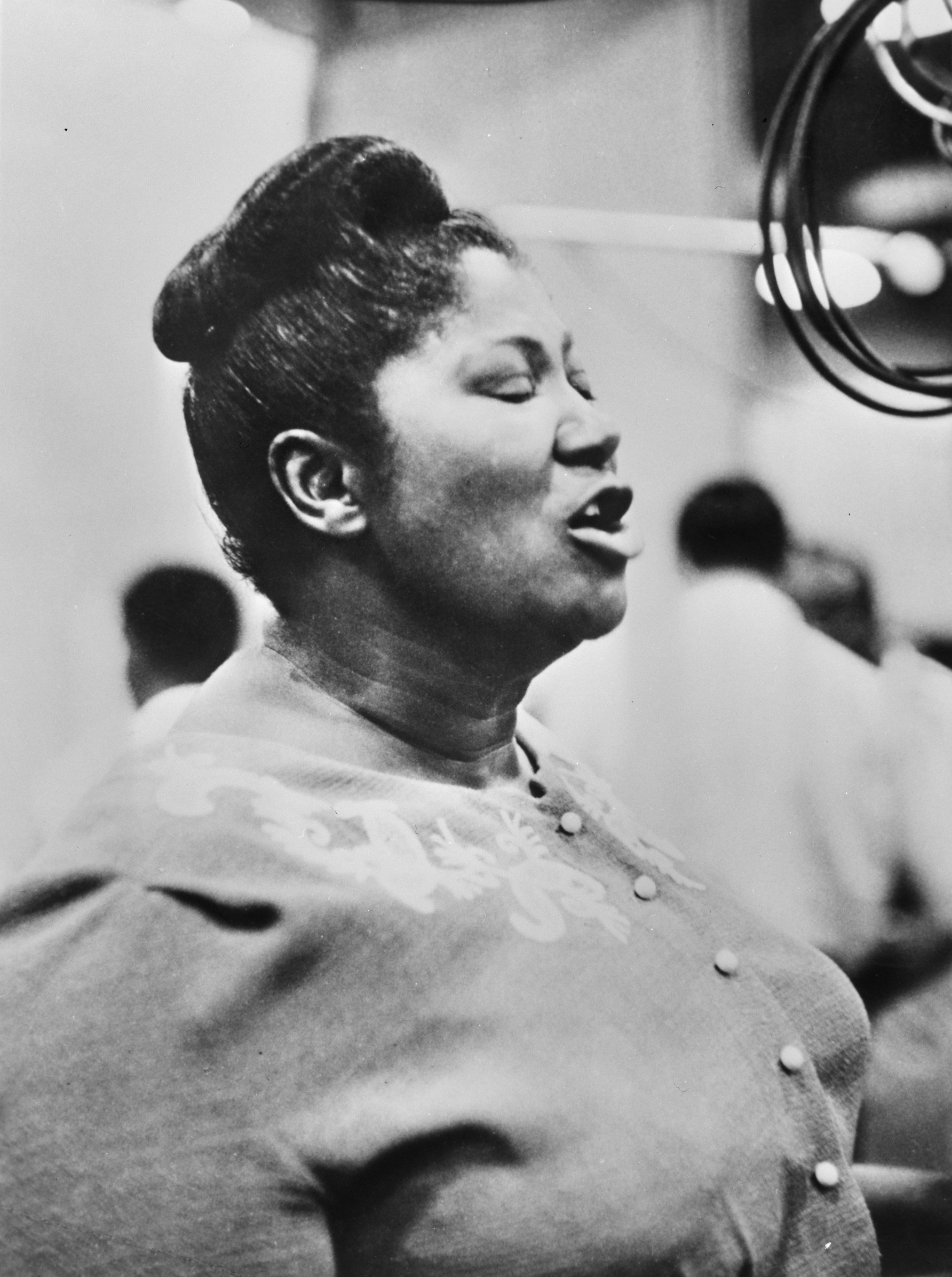 Collectie / Archief : Fotocollectie Anefo Reportage / Serie : [ onbekend ] Beschrijving : Zangeres Mahalia Jackson (zingend) Datum : 27 september 1971 Trefwoorden : zangeressen Persoonsnaam : Jackson, Mahalia Fotograaf : Fotograaf Onbekend / Anefo Auteursrechthebbende : Nationaal Archief Materiaalsoort : Negatief (zwart/wit) Nummer archiefinventaris : bekijk toegang 2.24.01.04 Bestanddeelnummer : 924-9807